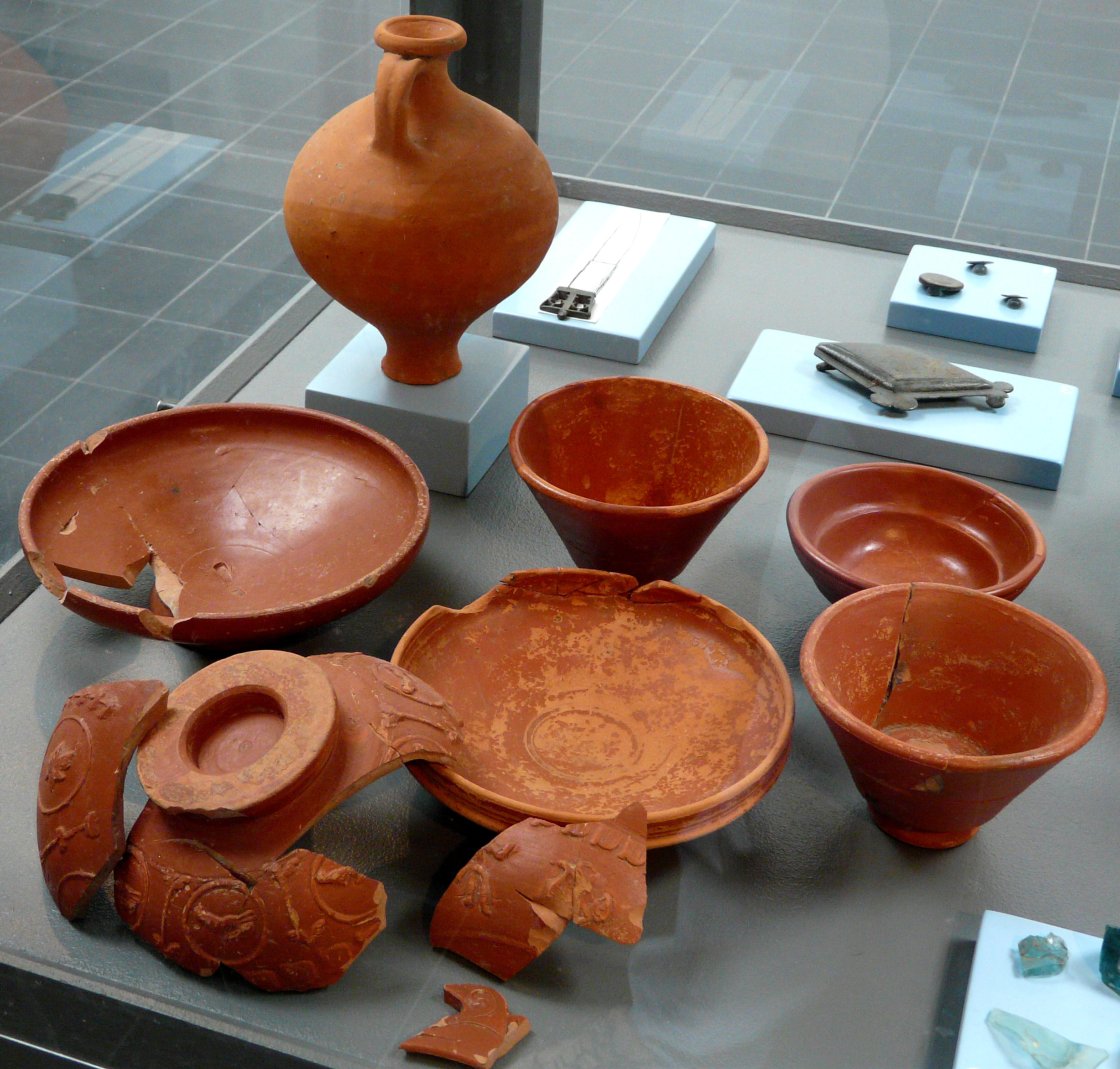 Terra Sigillata aus Bad Rappenau im Römermuseum Osterburken